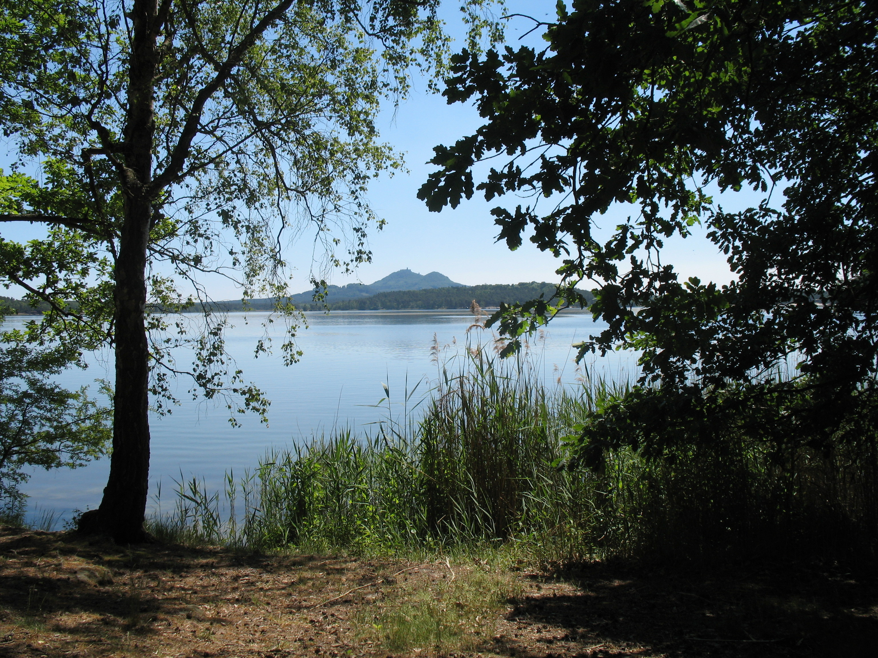 Pohled na Bezděz z břehu Máchova jezera u Starých Splavů